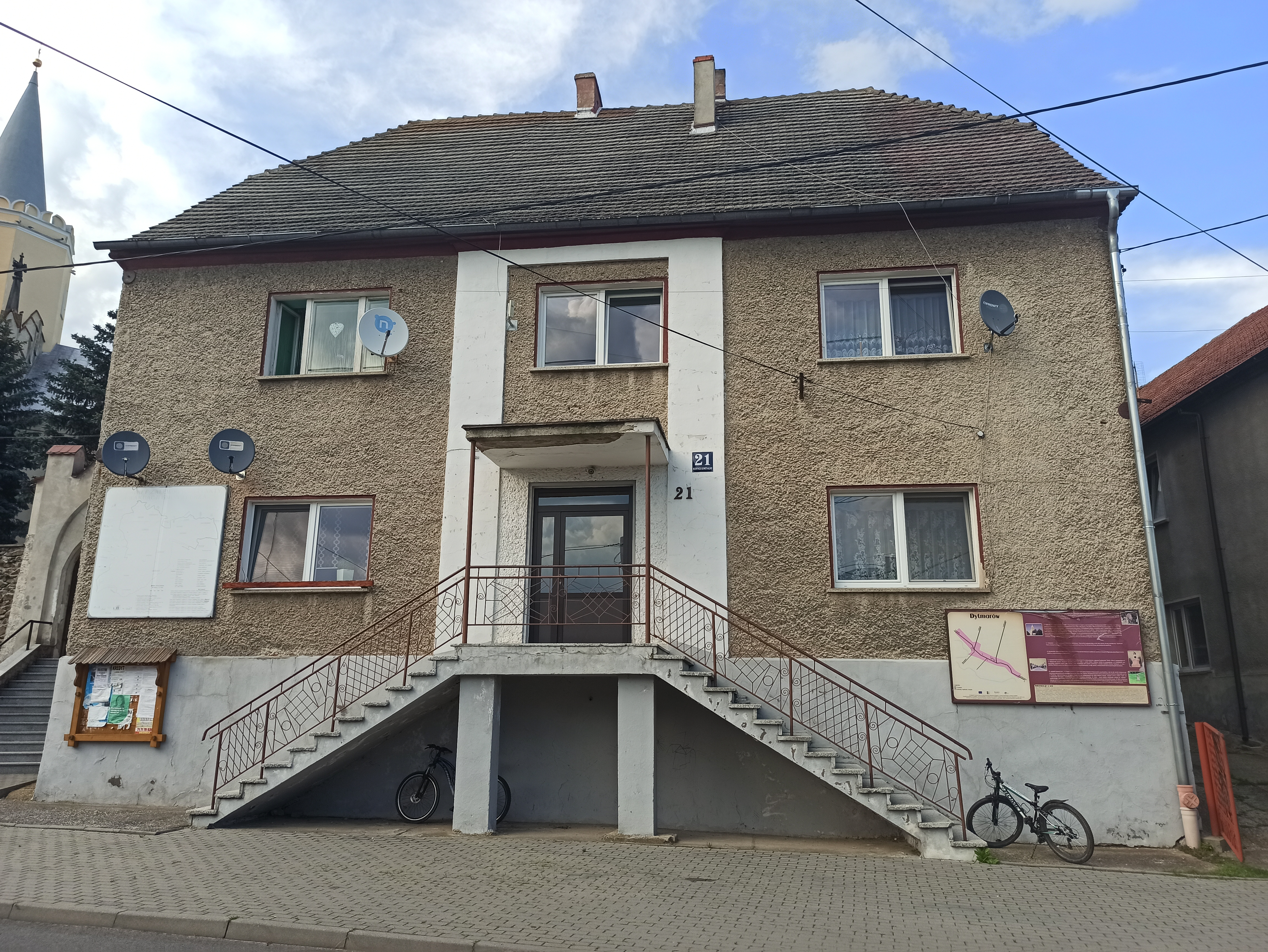 Dytmarów, dom nr 21, 1. poł. XIX w. – biblioteka publiczna. 10.1966.